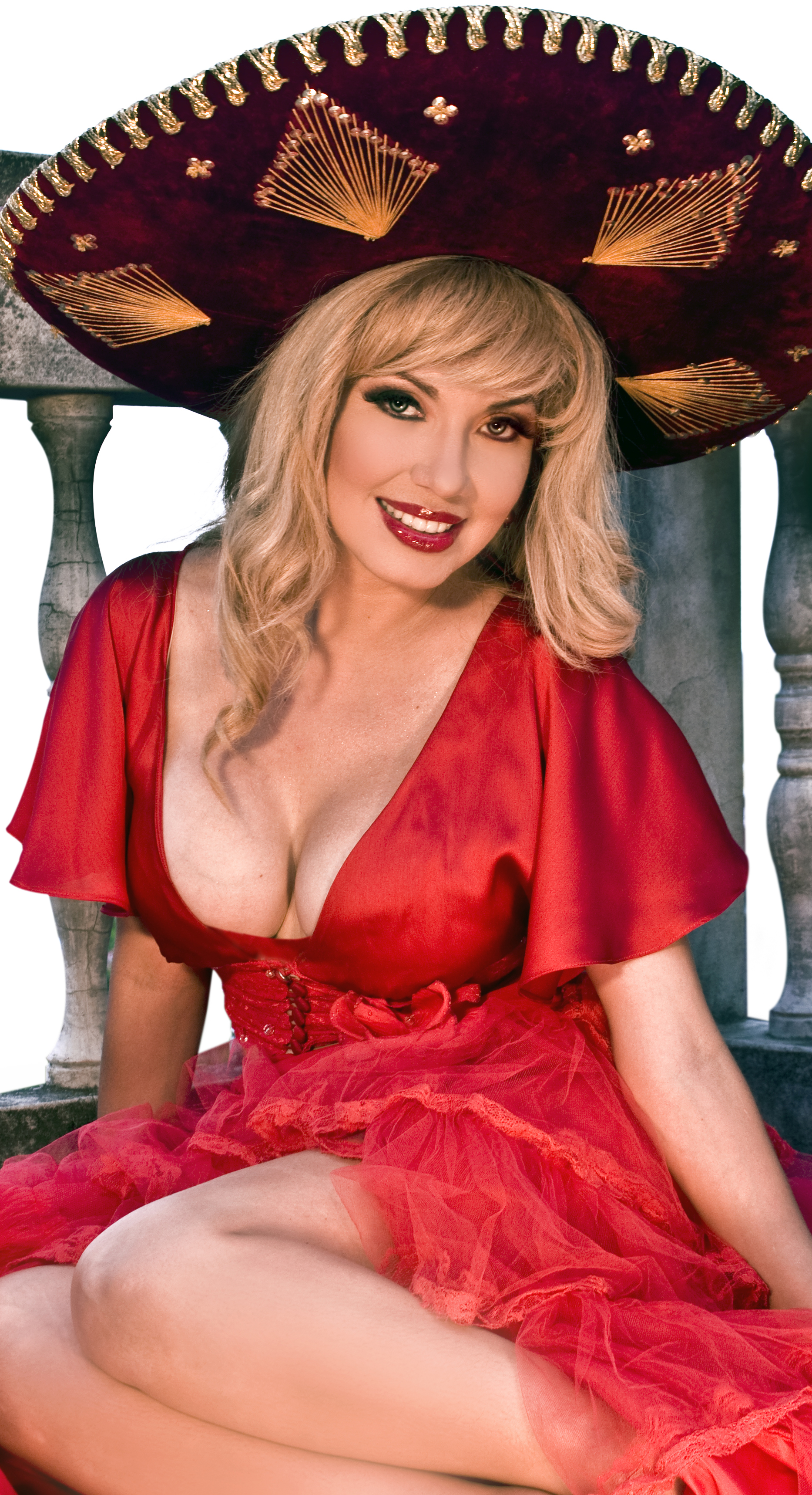 Sharon la Hechicera en 2010.